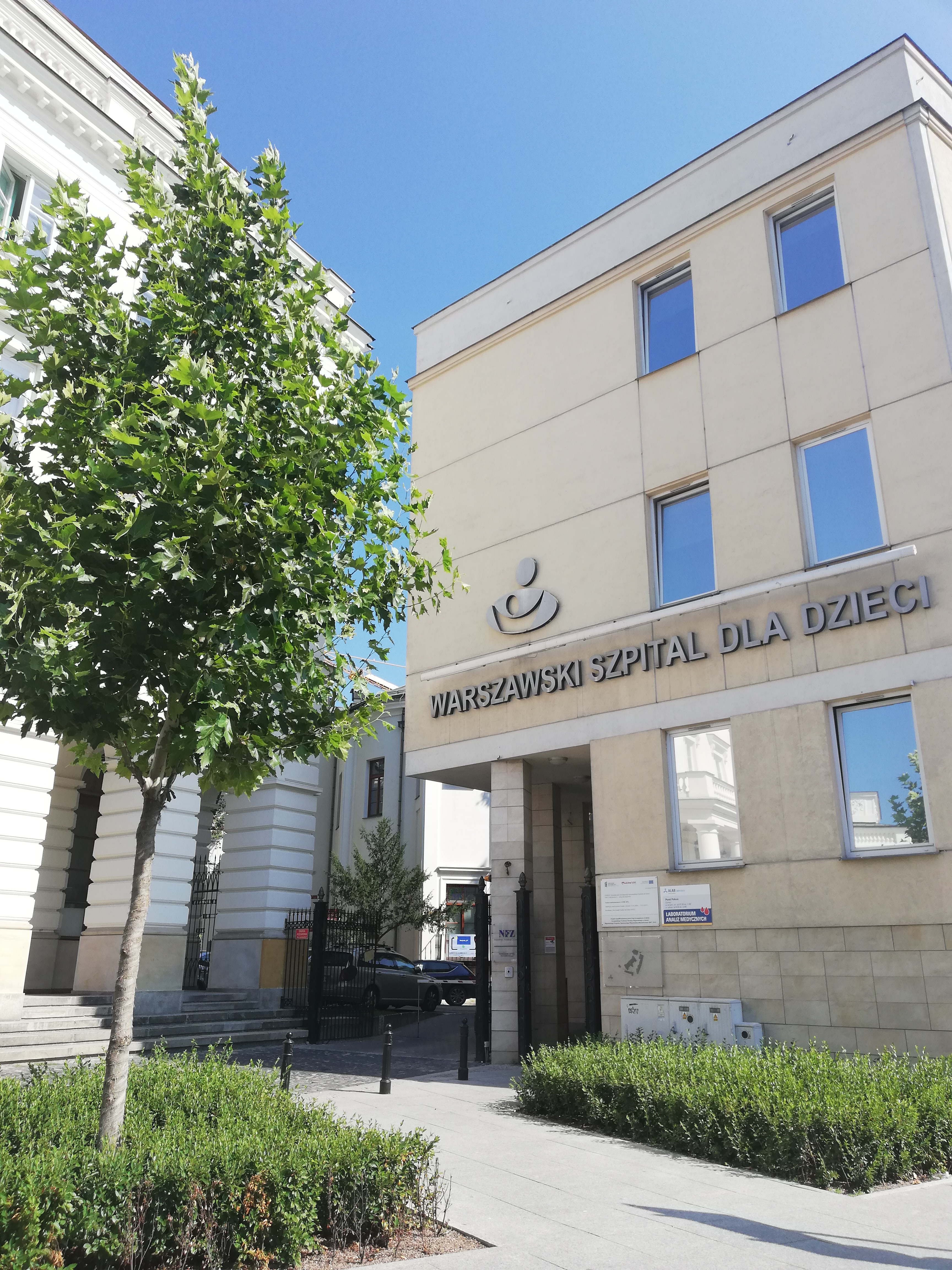 Wejście do Warszawskiego Szpitala dla Dzieci od ulic Świętokrzyskiej